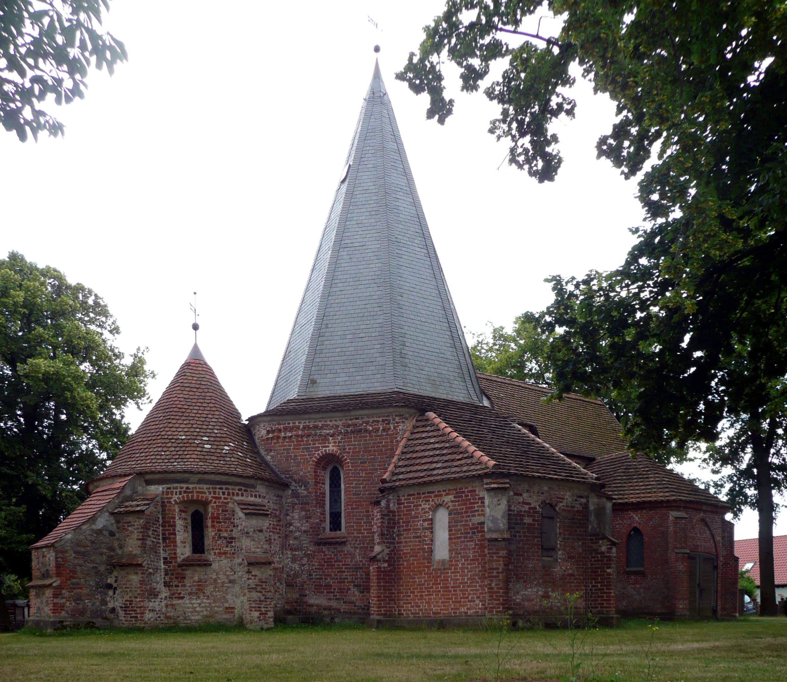 Oktogonale Dorfkirche Ludorf, Landkreis Müritz